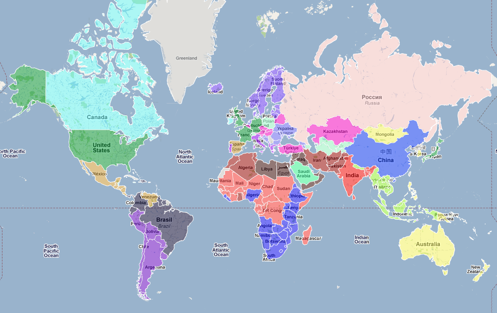 Paises agrupados en 24 distritos de eleccion de directores ejecutivos del FMI